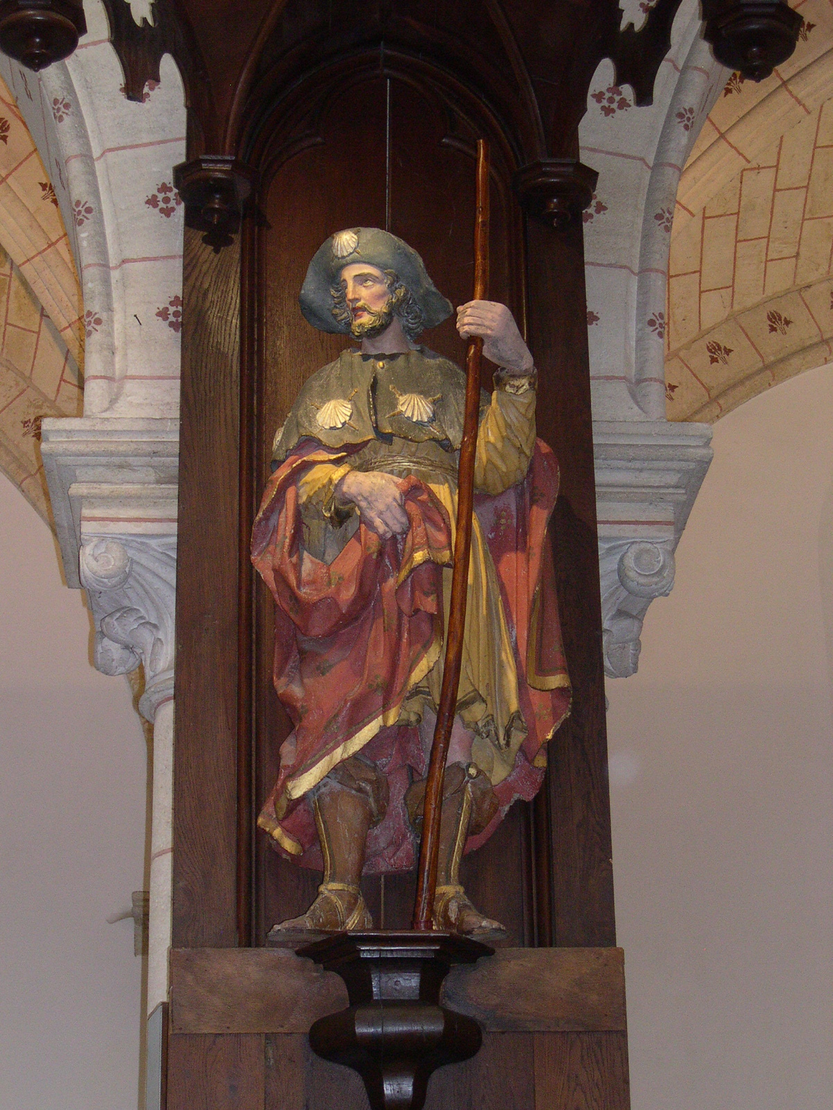 statue de saint Jacques pèlerin du XVIIIe siècle, en bois polychrome